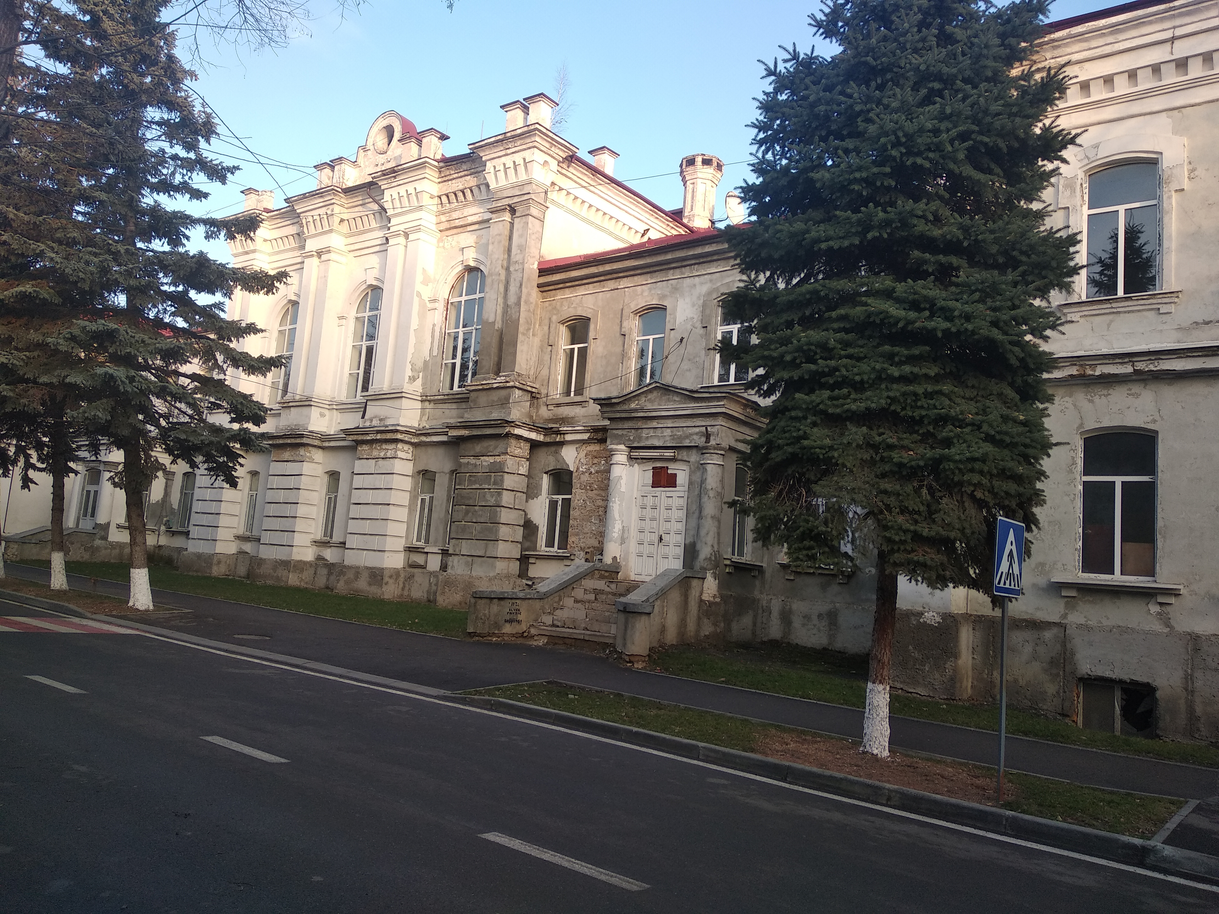 Construit în anul 1887 de arhitectul Vladimir Țâganco, întruneşte diverse detalii arhitectonice, fiind atribuit stilului clasicist, Aceasta se plasează pe strada Vasile Mahu în preajma parcului Puşkin şi restaurantului ,,Primăvara